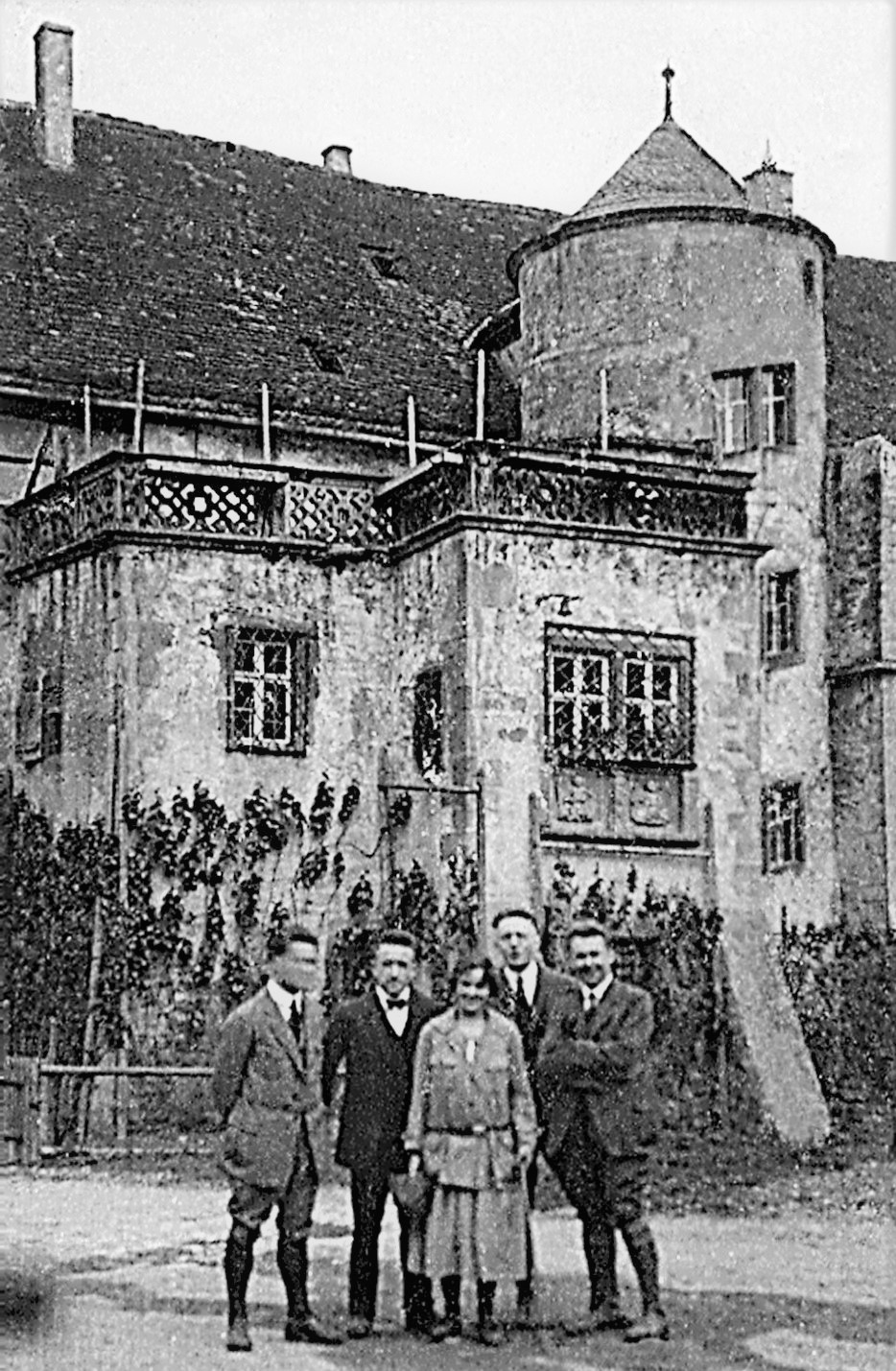 Schloss Liebenstein, südlich von Neckarwestheim, Hauptgebäude (Palas des Oberen Schlosses), Foto 13. Juni 1926